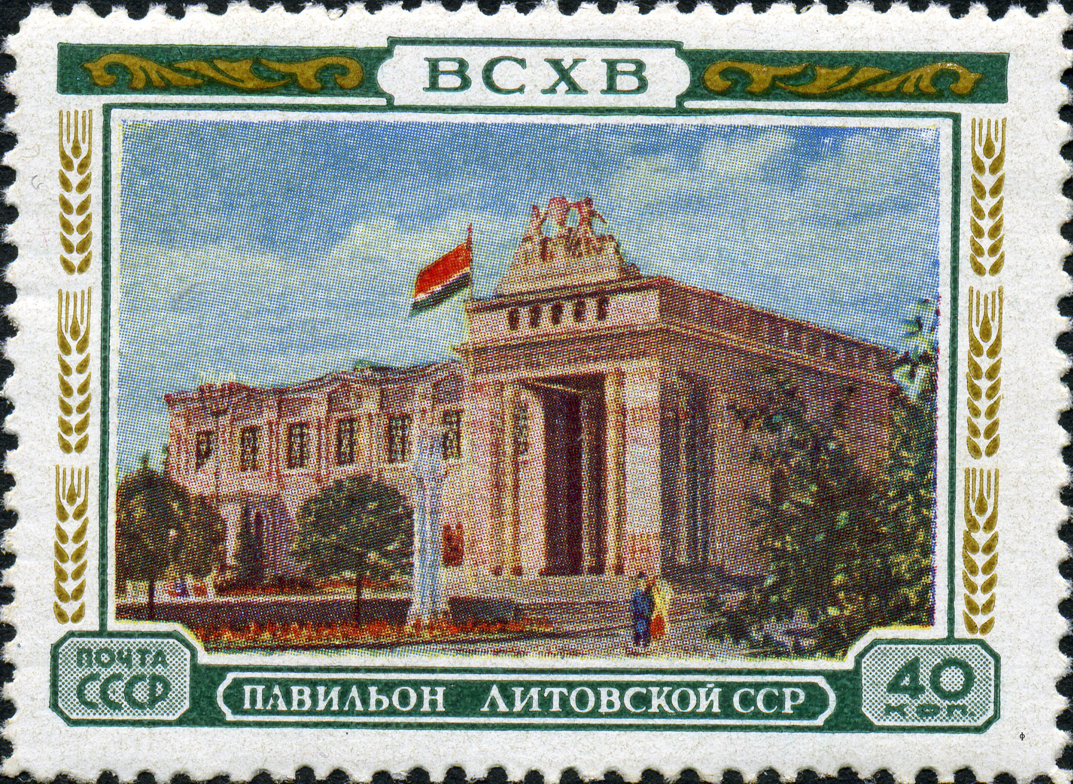 Марка СССР